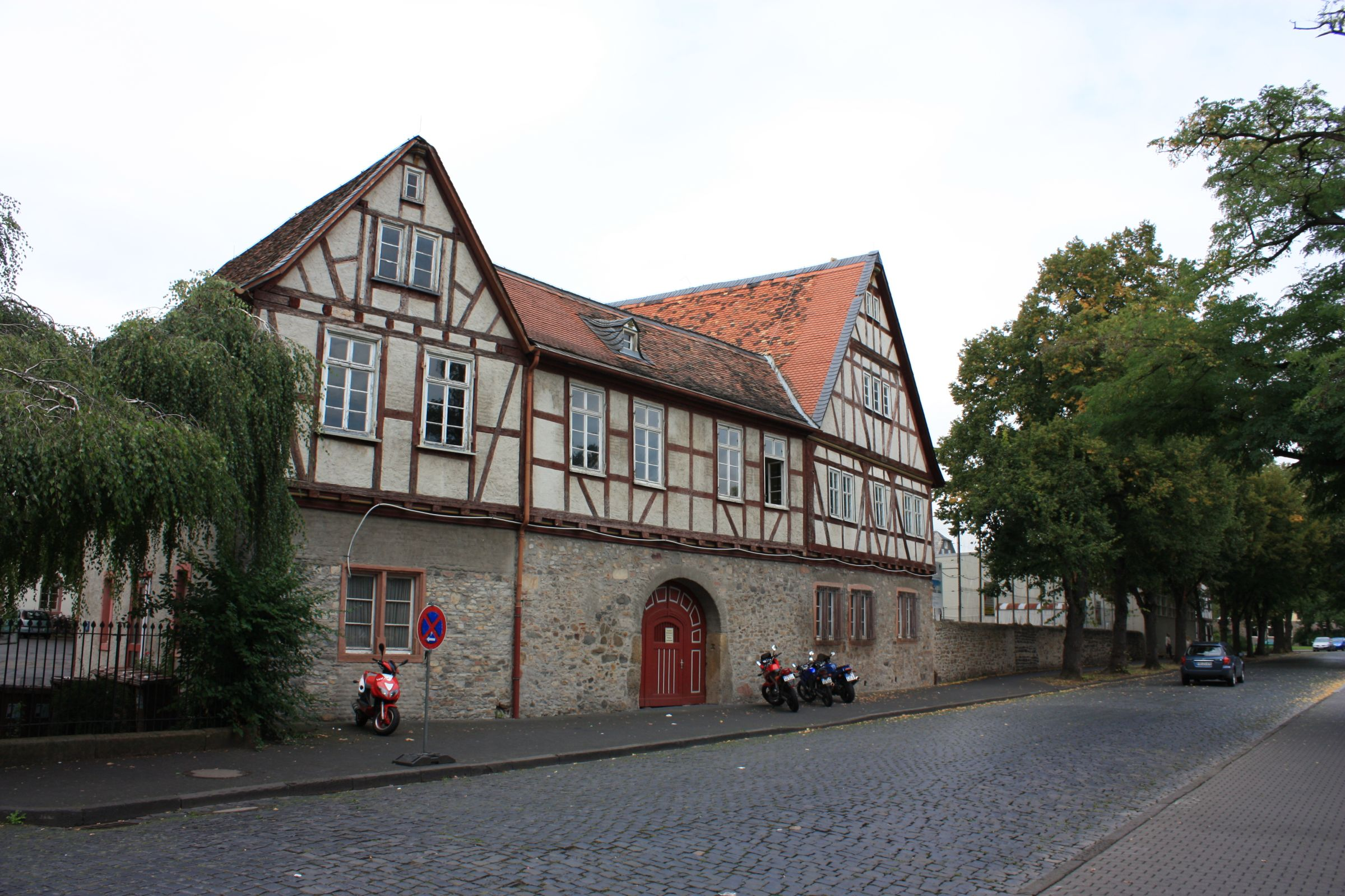 Burgmannenhäuser in der Burg Friedberg (erbaut 16. Jahrhundert), heute Teil des Burggymnasiums